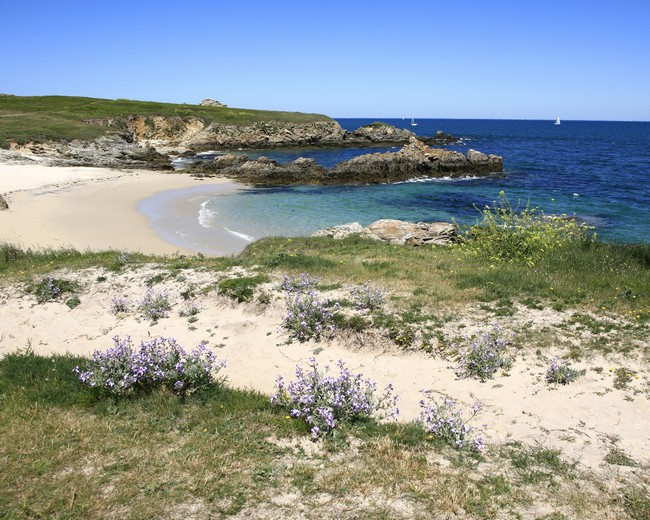 Ile de Hoedic-Morbihan Tourisme-Marc Schaffner